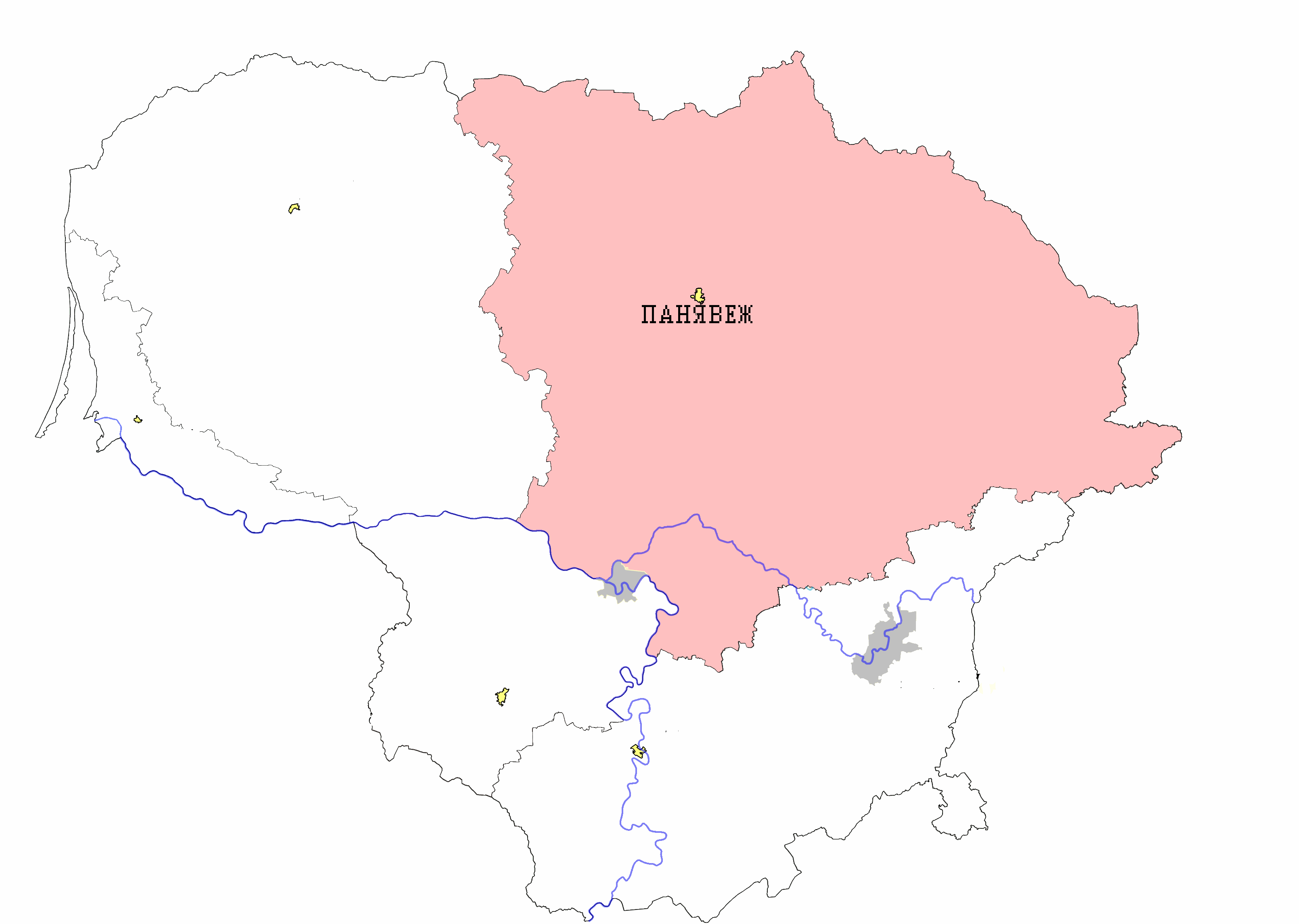 Беларуская (тарашкевіца): Мапа Аўкштоты